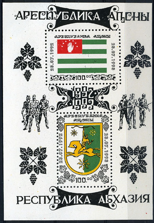 Первый почтовый блок Абхазии в честь первой годовщины независимости республики